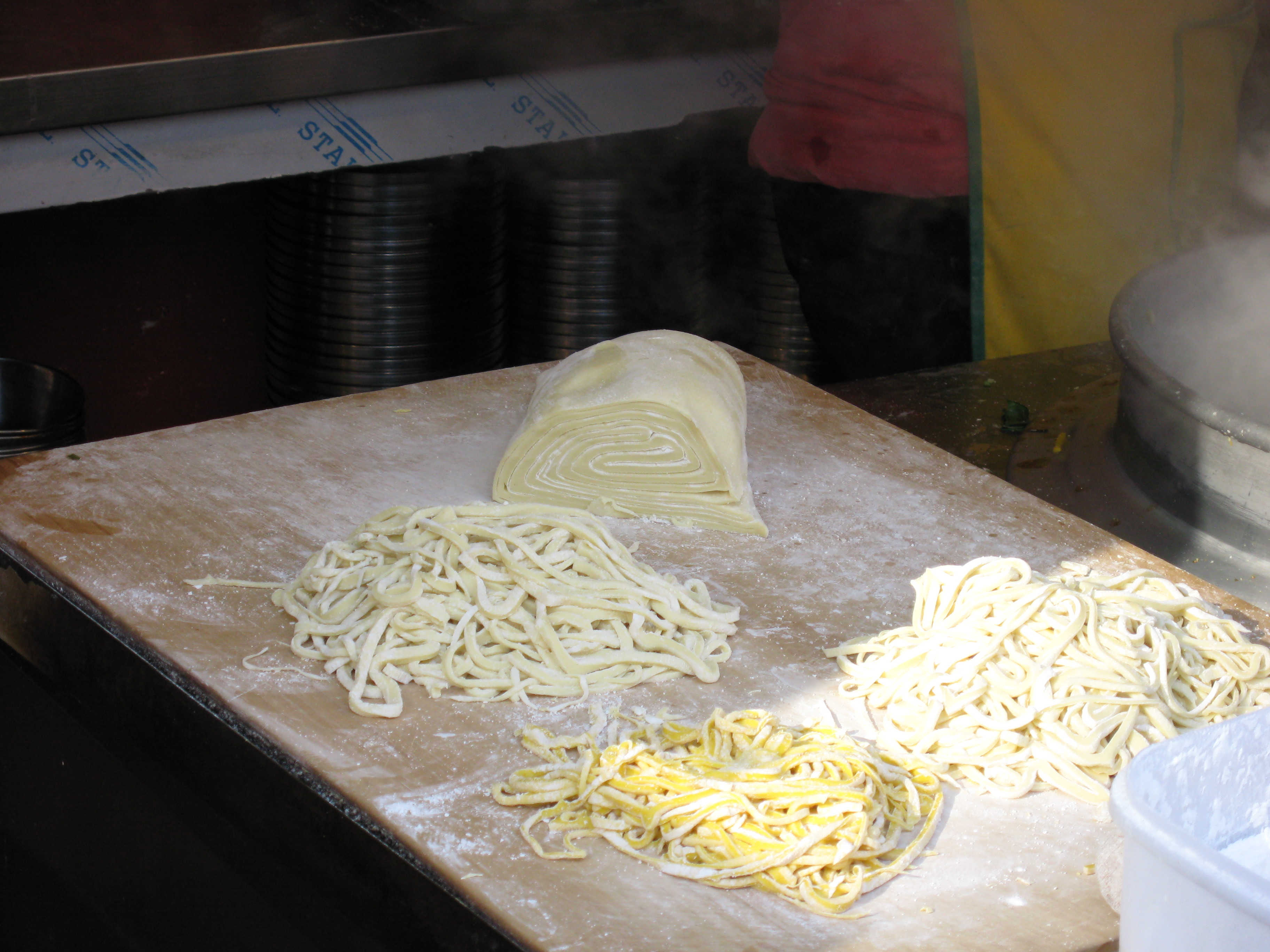 Korean noodles-Kalguksu